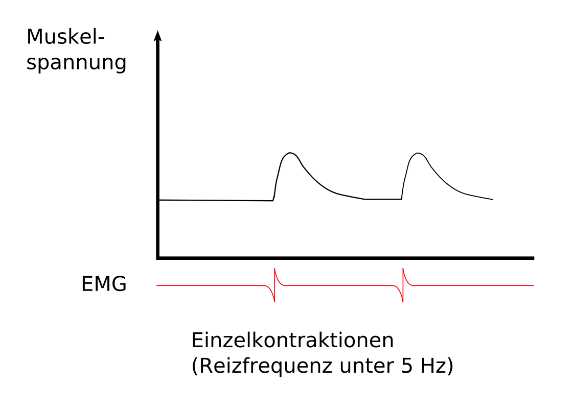 Muskulatur: Einzelzuckung